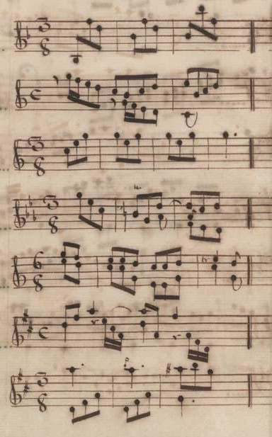 Table du volume I des manuscrits de Venise (incipit des sonates 8 à 14, K. 155 à 161).